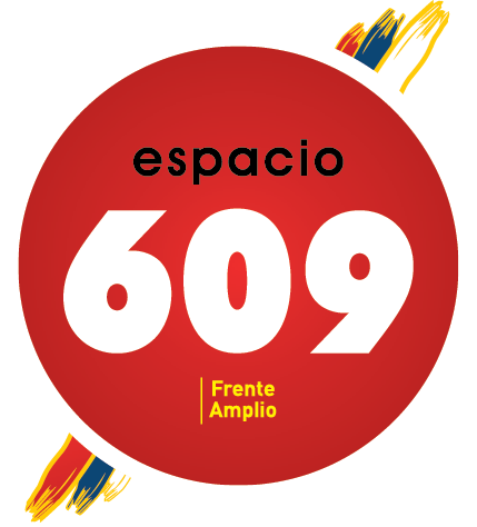 Logo de la 609